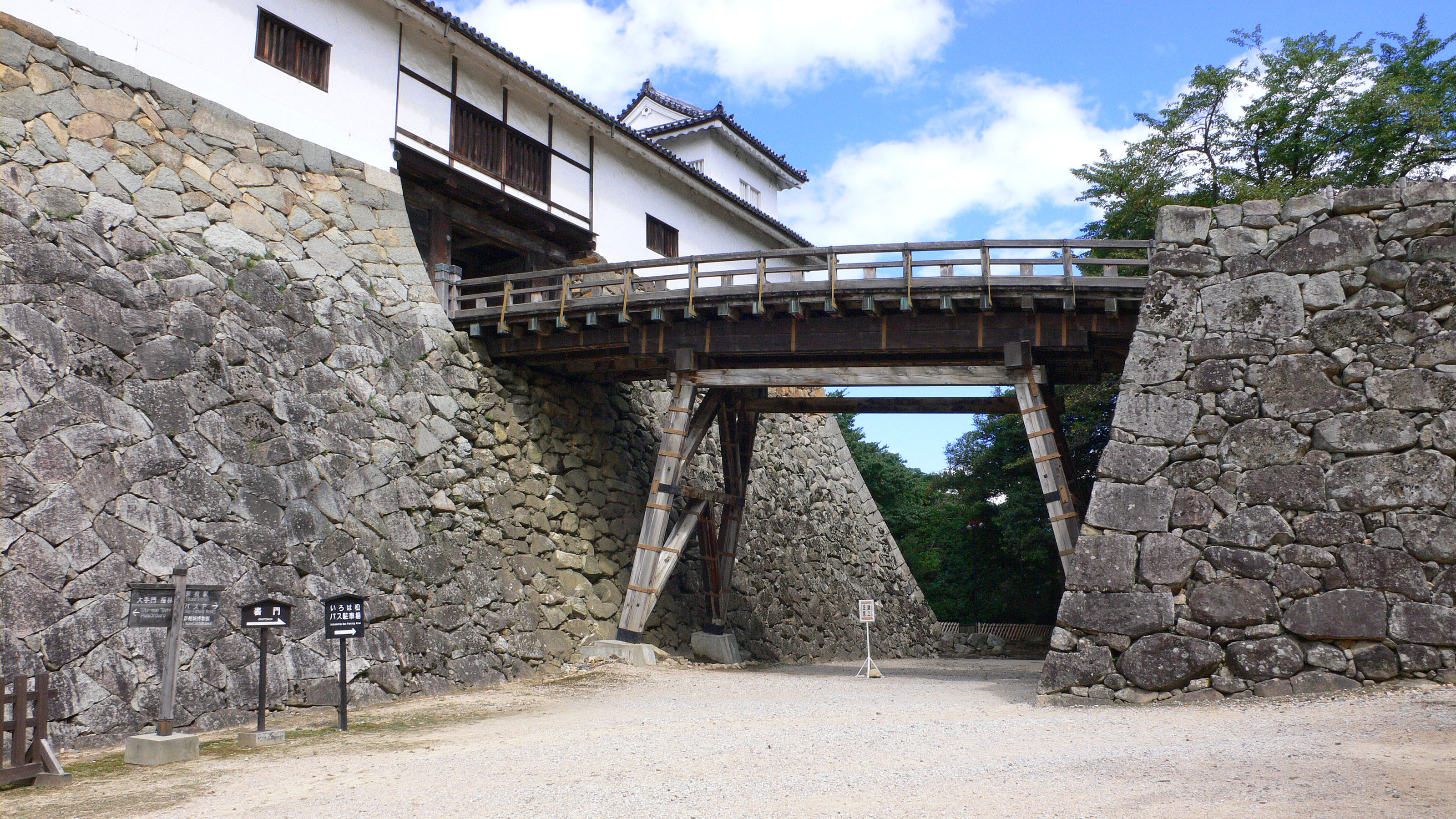 Hikone Castle in Hikone, Shiga, Japan